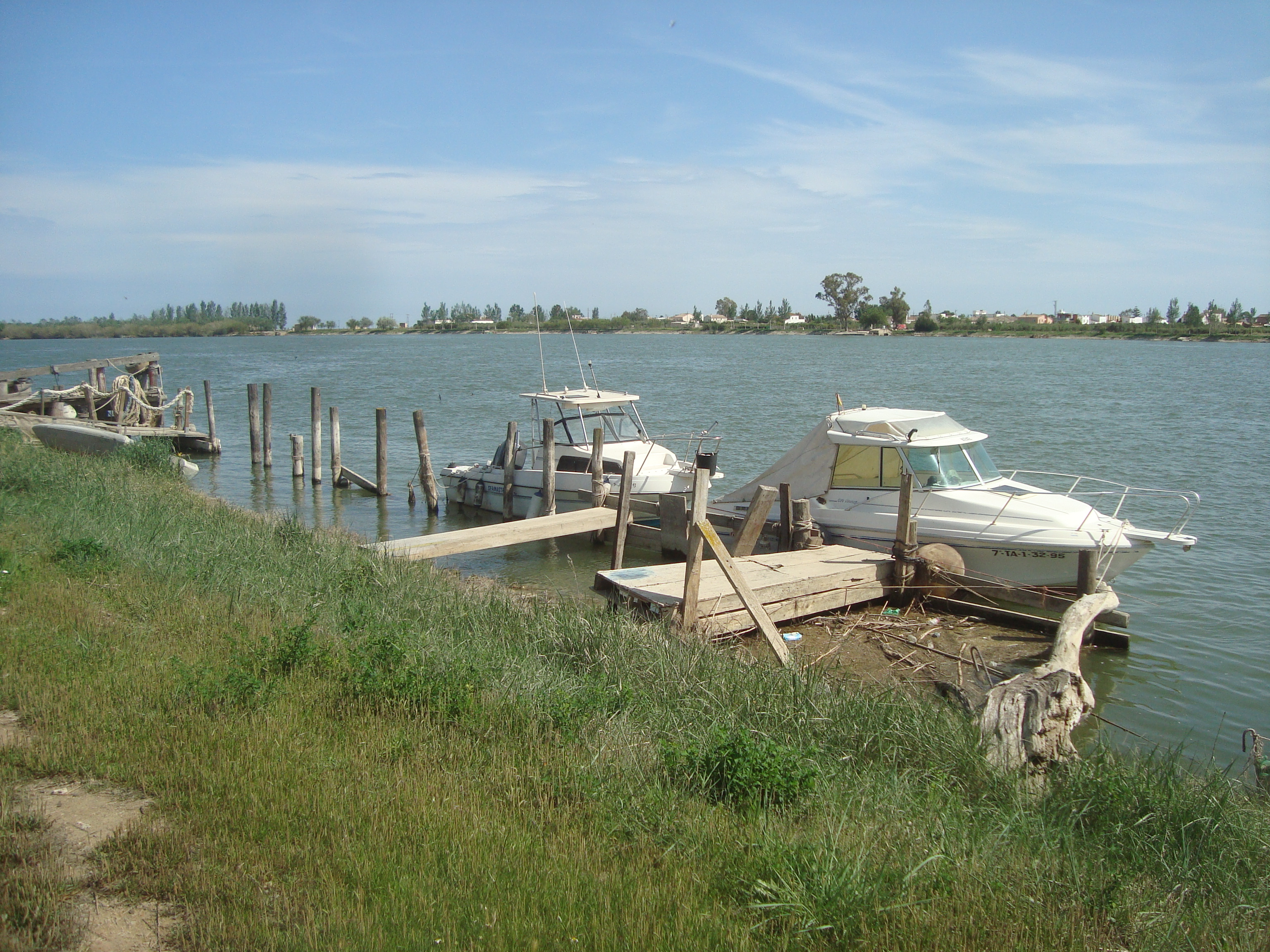 Embarcaciones amarradas sobre el cauce del río Ebro a su paso por Deltebre (Tarragona)